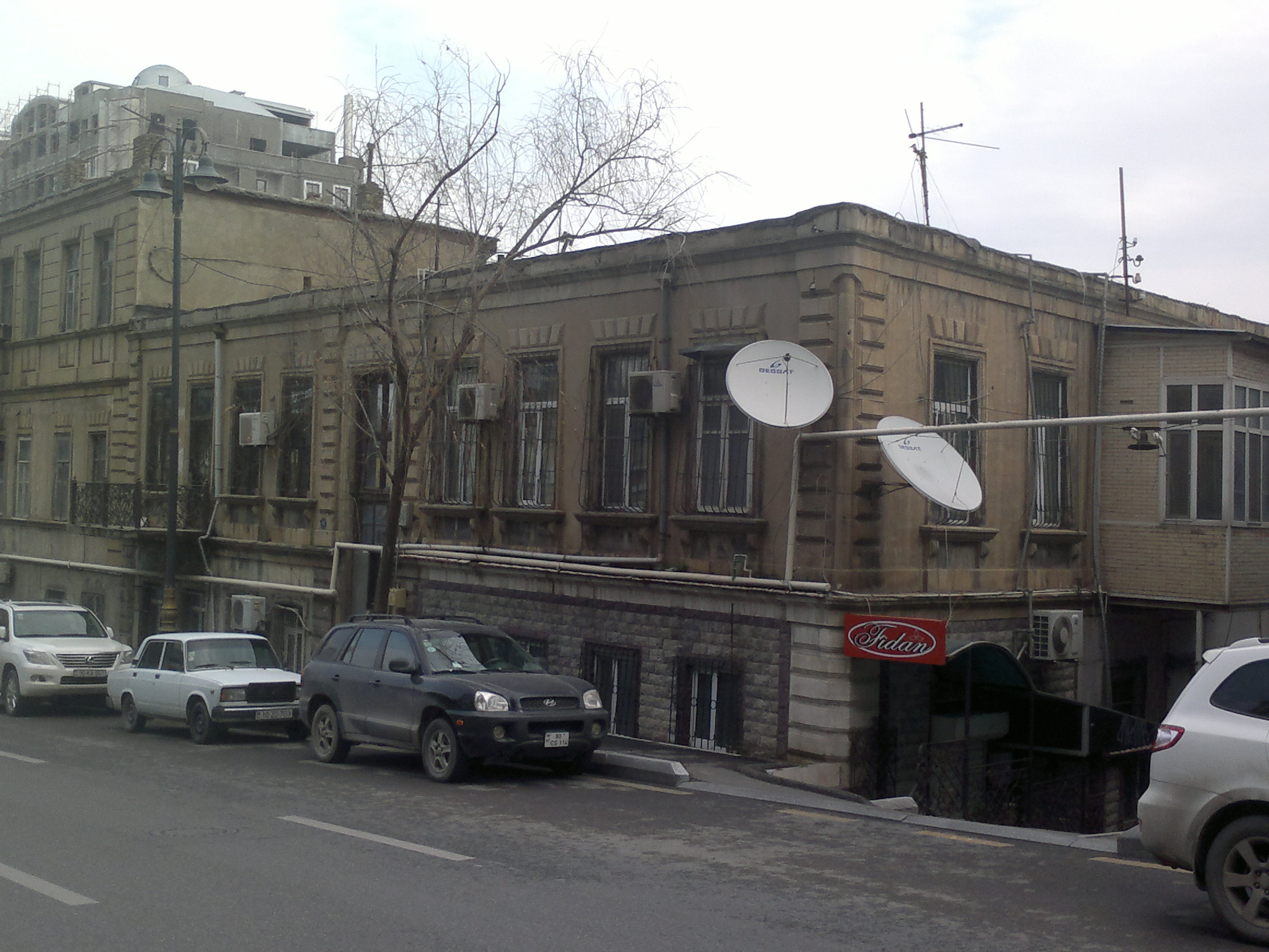 Building in Hasan Seyidbeyli Street 24